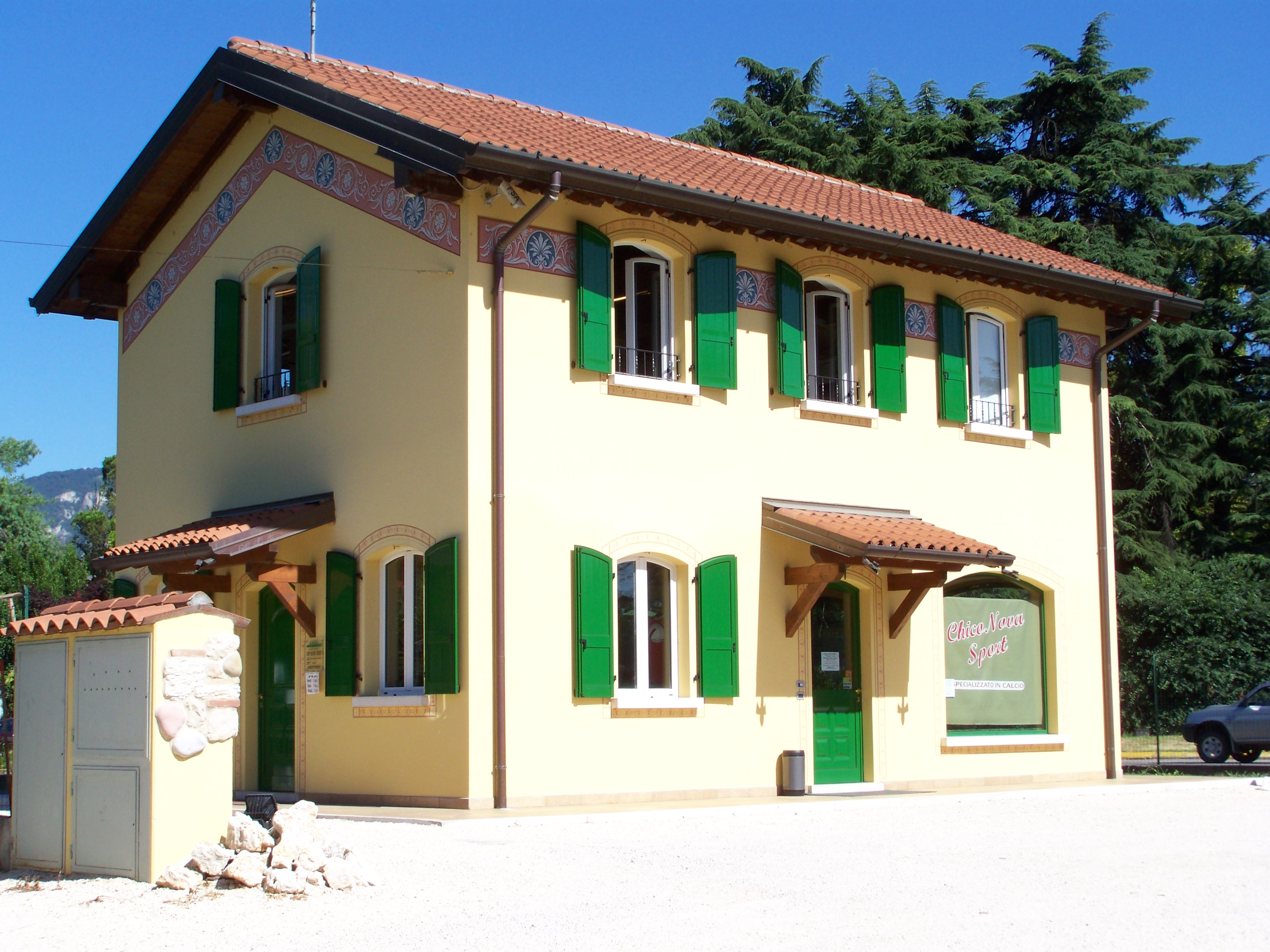 Lato ferrovia della stazione di Virle Treponti sulla ferrovia Rezzato-Vobarno.